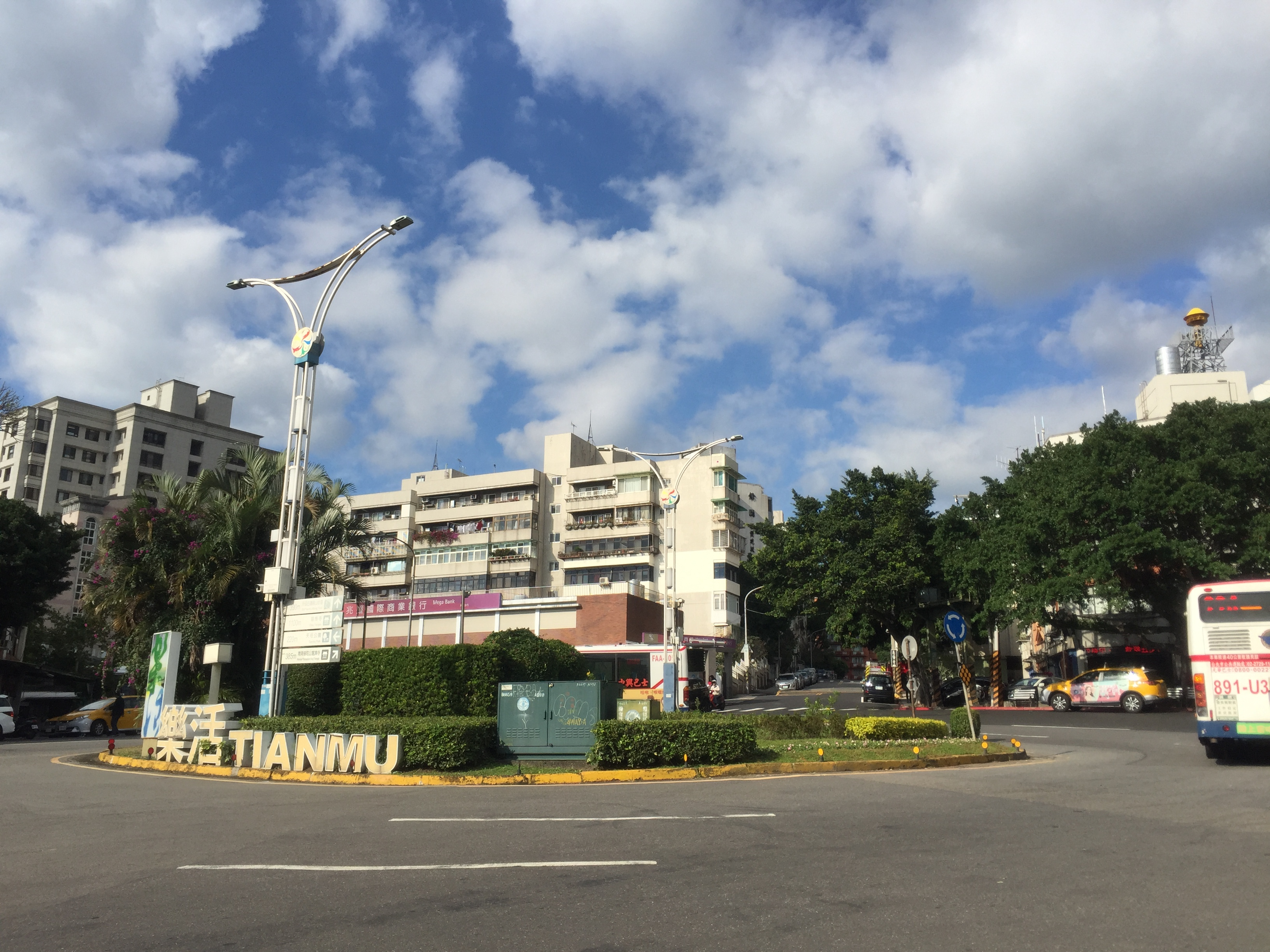 台北市士林區天母里中山北路七段上天母圓環旁人行步道上之景